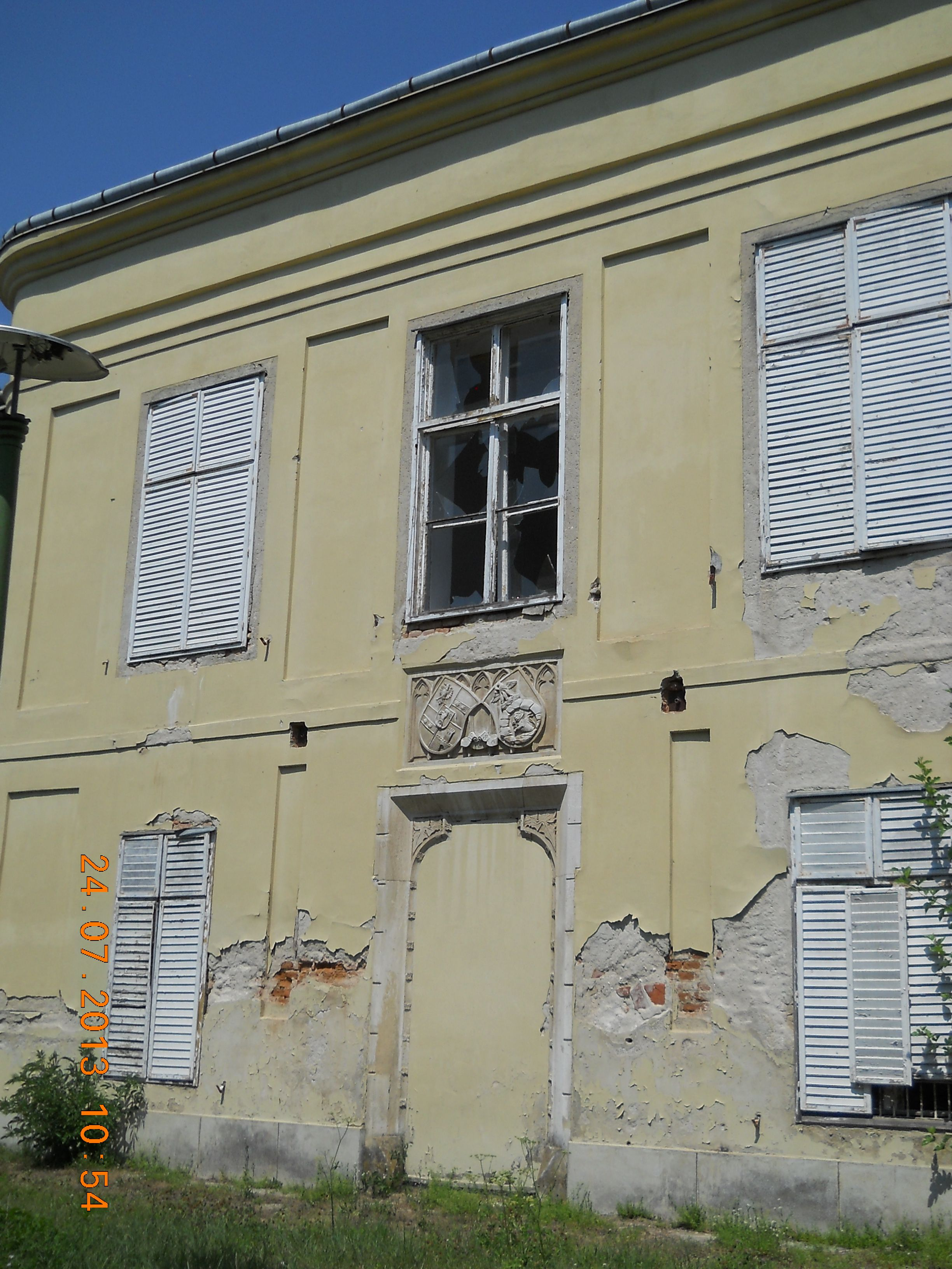 Erdődy-kastély. Most a Mezőgazdasági gépészképző szakiskola kollégiuma. Késő reneszánsz és barokk, 16-18. sz. Átépítve és bővítve romantikus stílusban 1850 körül. Főlépcsőház eklektikus, sgraffitós díszítésű 1870-ből. Kertje védett.-Vas m., Vép, Szent Imre u. 36-38. This is a photo of a monument in Hungary. Identifier: 9512